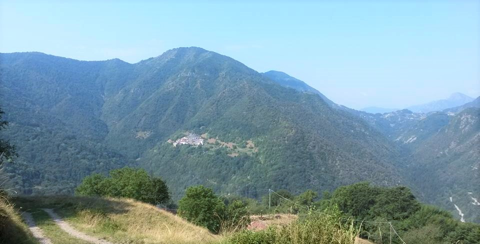 Bollone di Valvestino